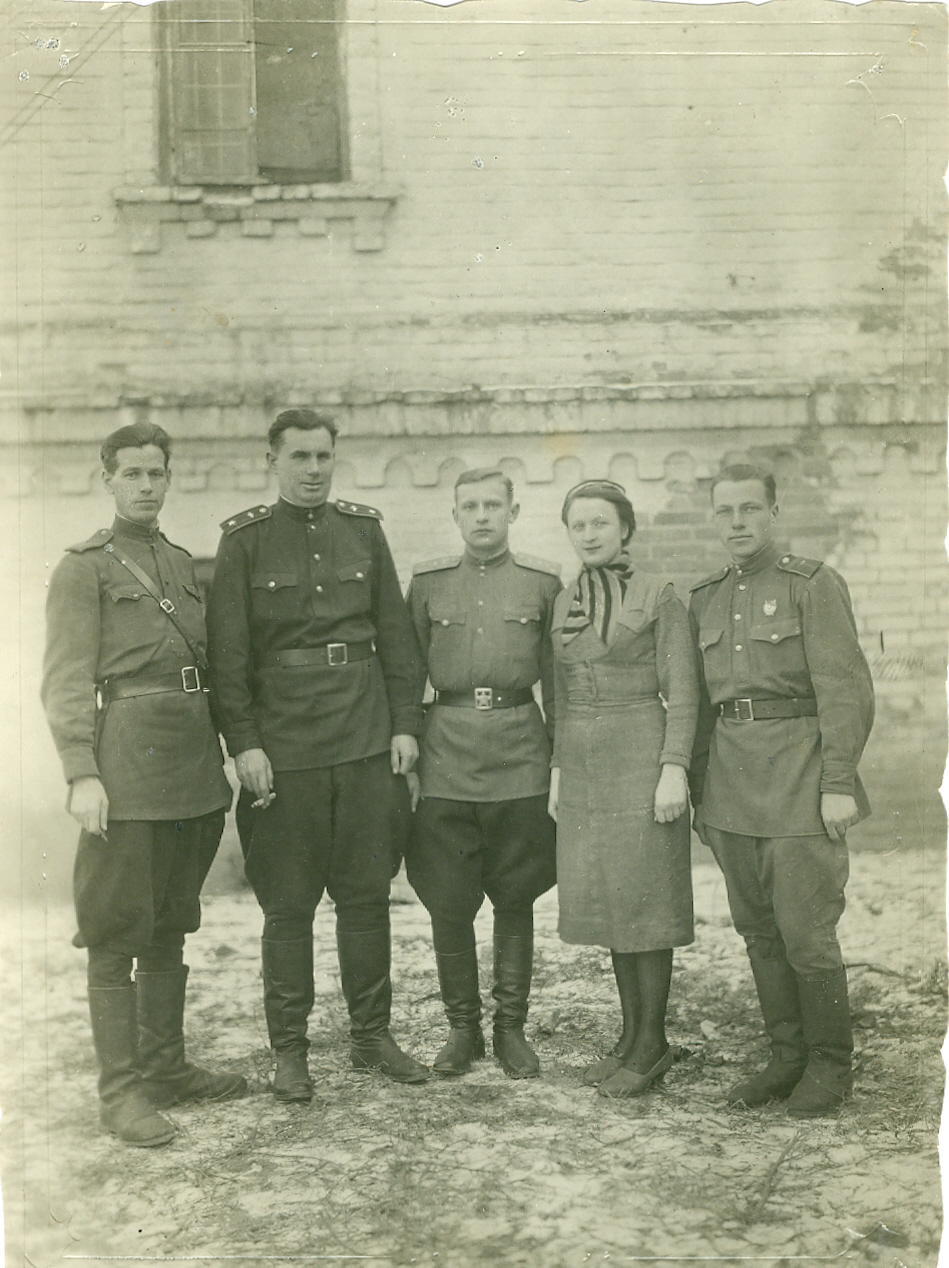 Дед Александр (прадед Вани)boris